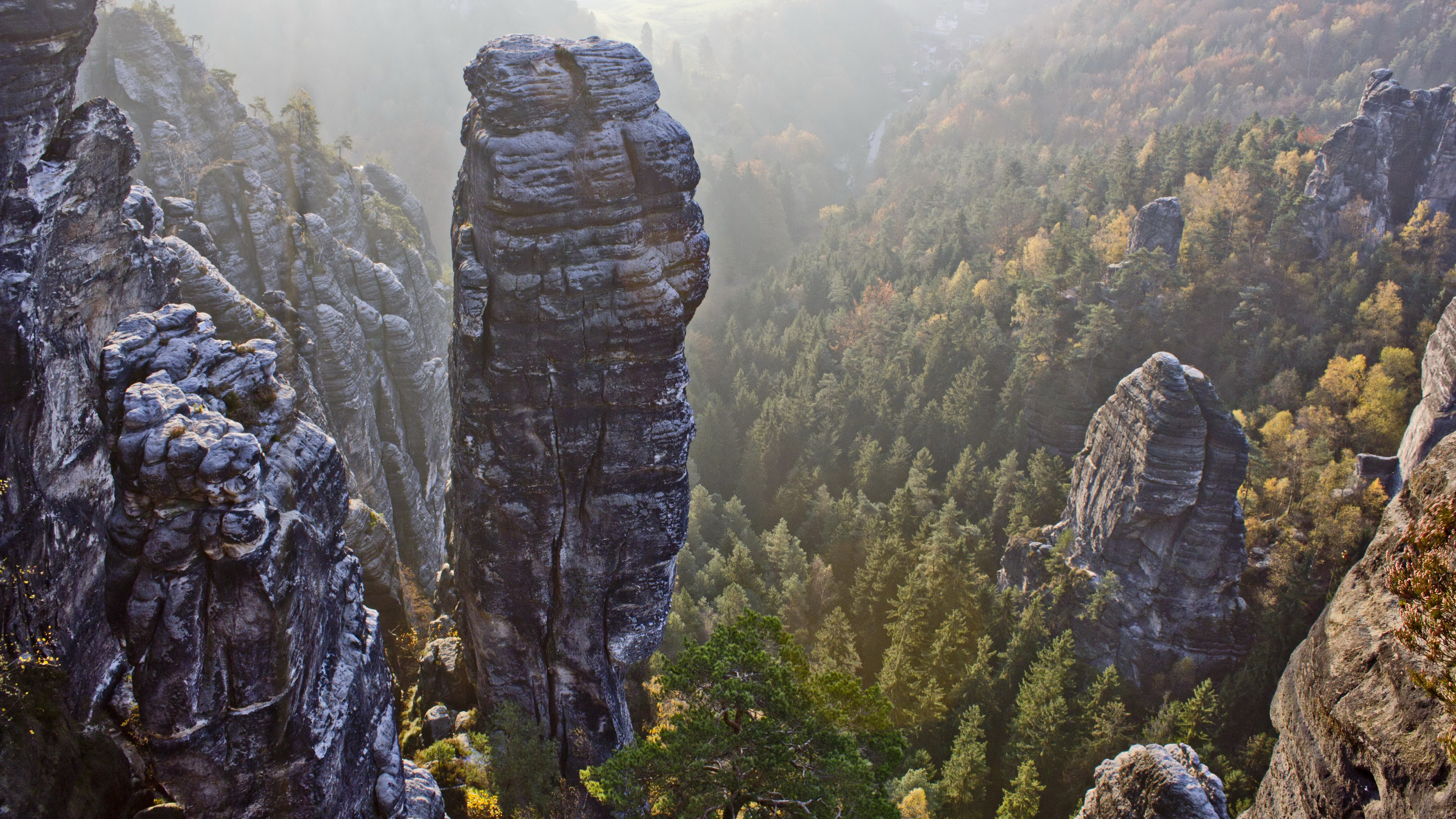 Der "Höllenhund", ein markanter Kletterfelsen im Rathener Gebiet (Sächsische Schweiz)